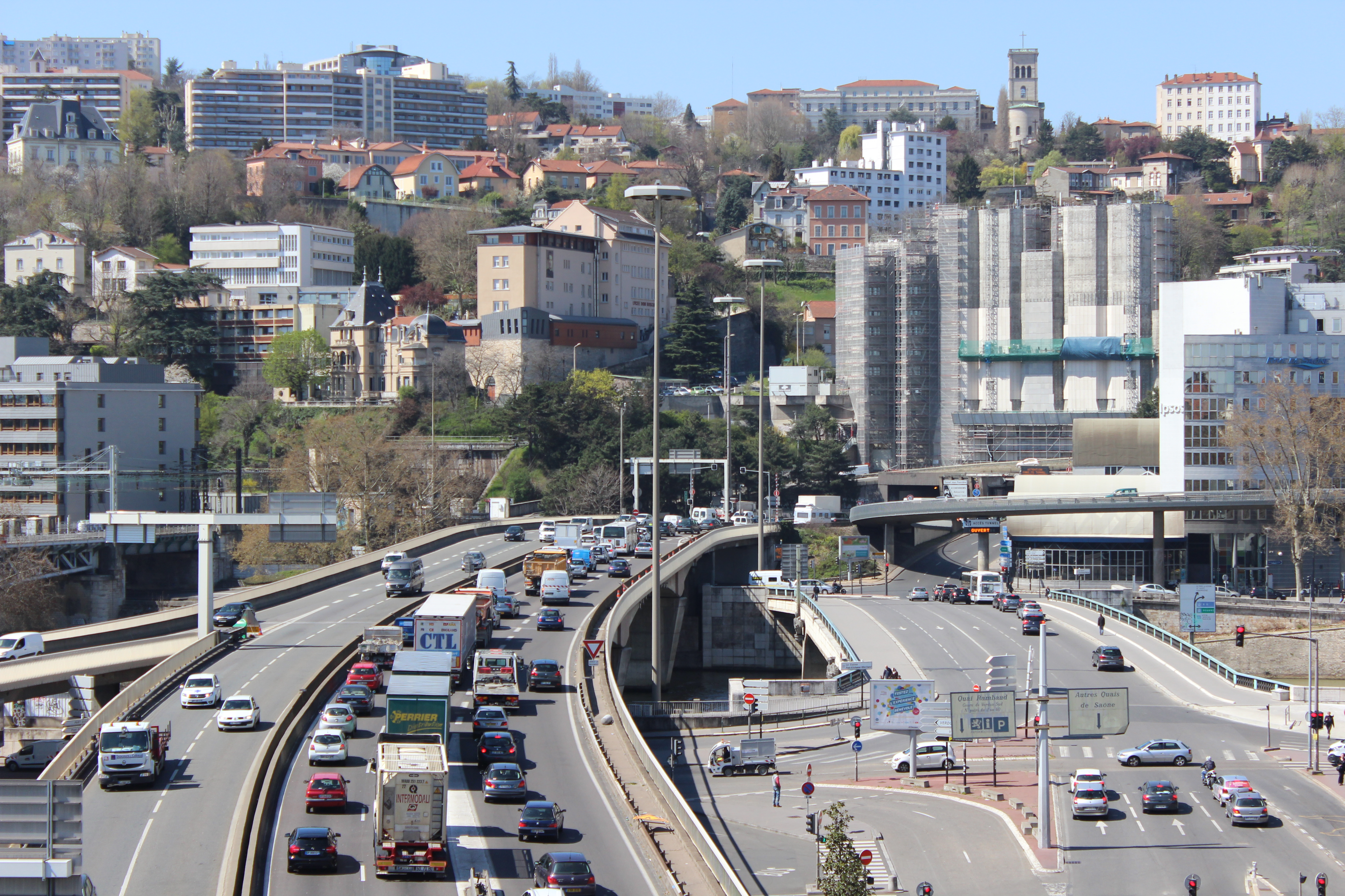 À Lyon, A6 et Pont Kitchener, en direction du tunnel de Fourvière.